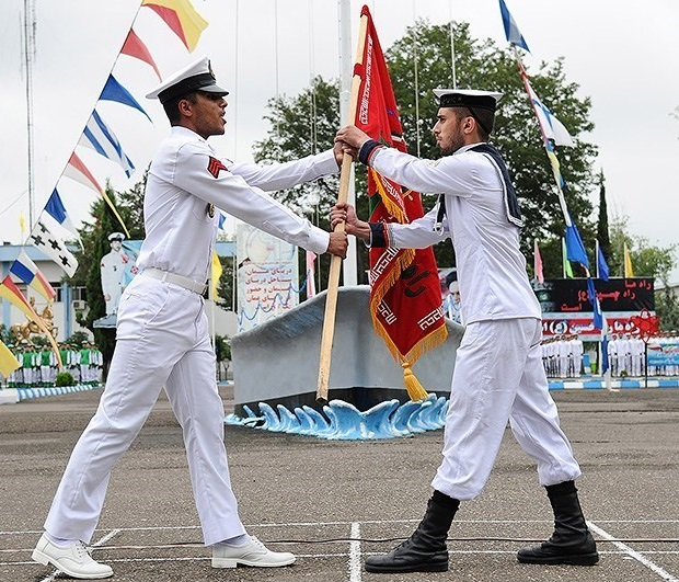 تصویر خبرگزاری تسنیم از صبحگاه مشترک نیروی دریایی ارتش در مرکز آموزش تخصص‌های دریایی رشت